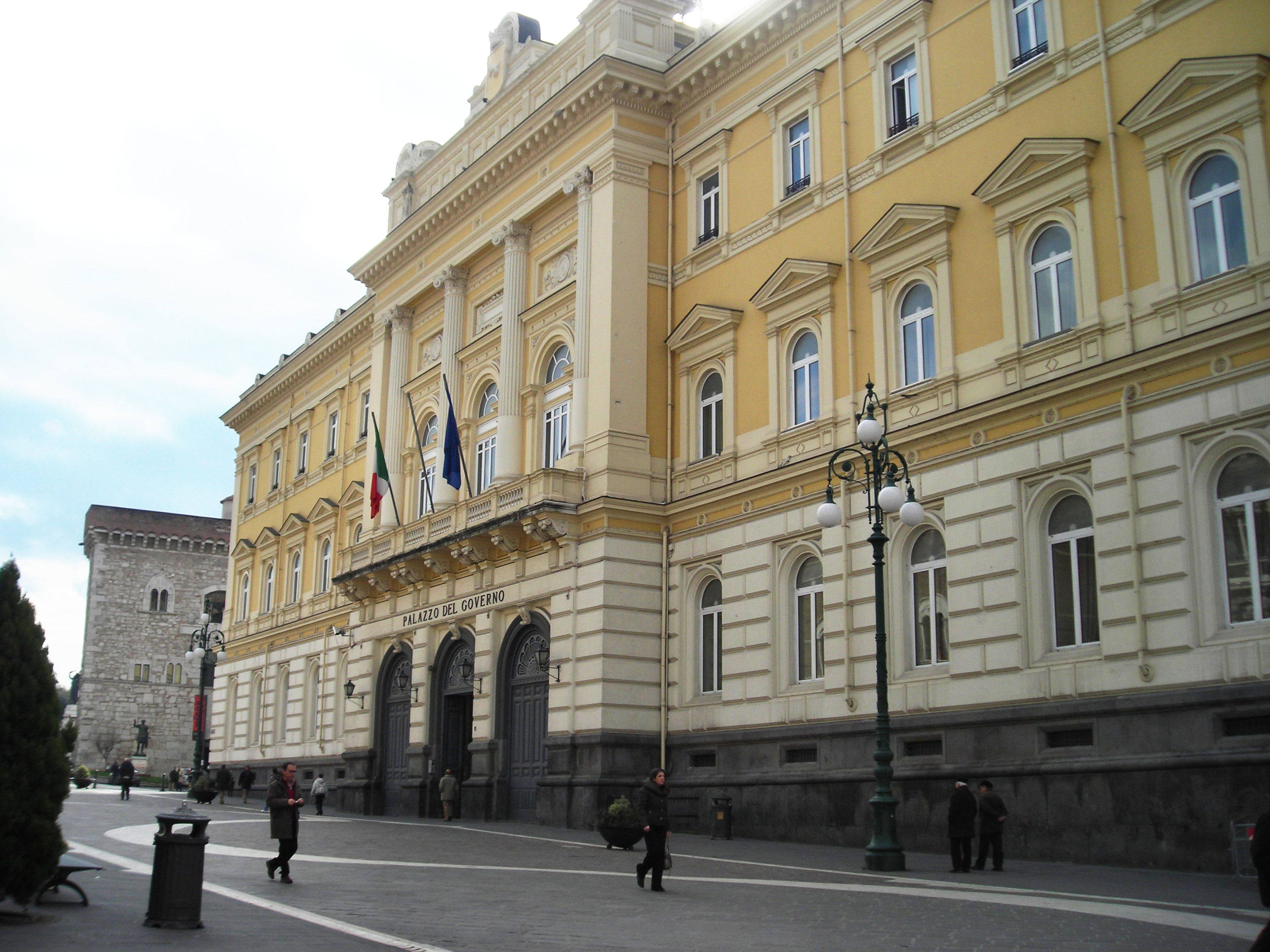 Palazzo del Governo, Benevento